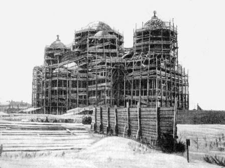 Новочеркасский Вознесенский собор, строительство. Фото 1889 г.